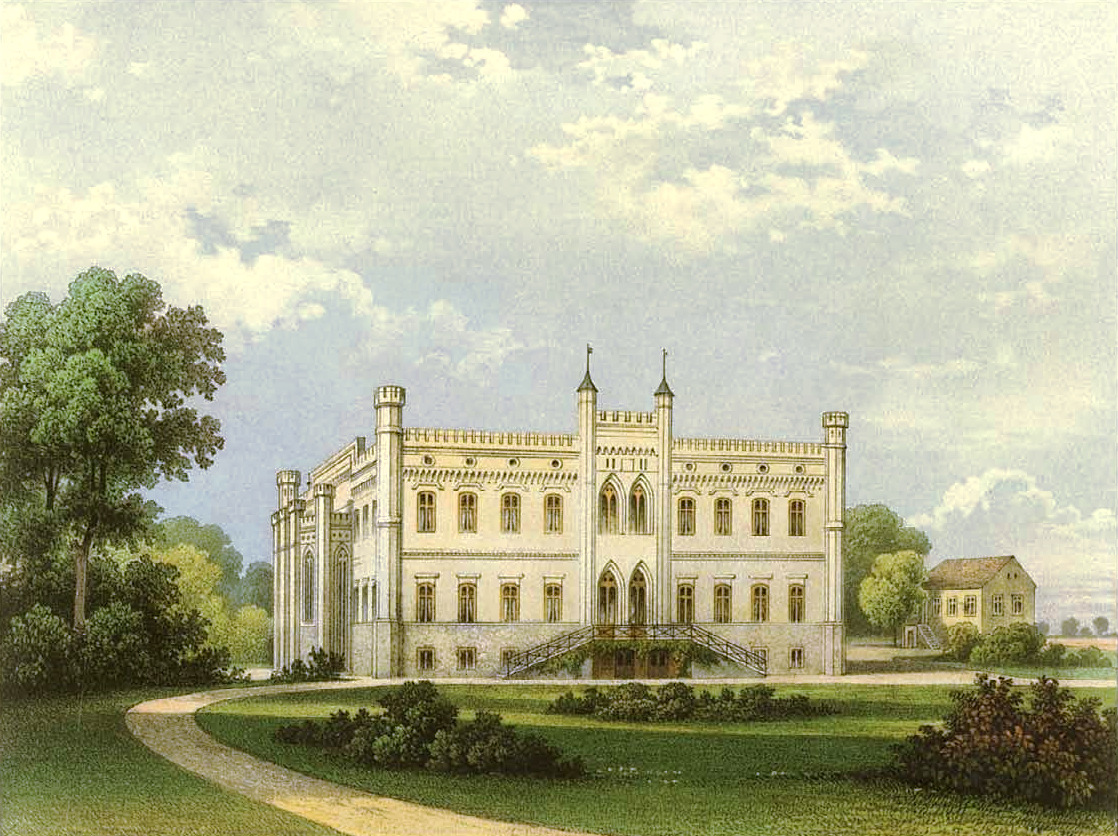 Schloss Auerose, Kreis Anklam, Provinz Pommern, Lithografie aus dem 19. Jahrhundert